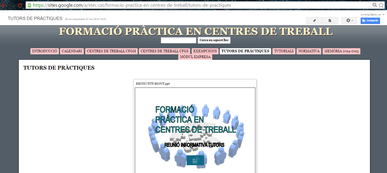 Exemple de Google Sites